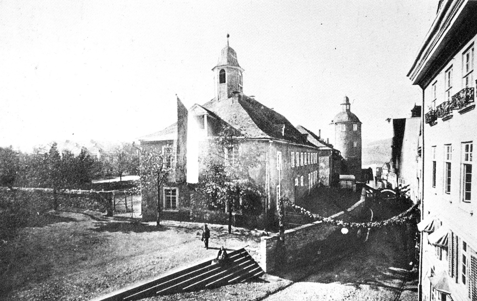 Unteres Schloss auf dem Siegberg in Siegen/Westfalen: Der Marstall des Schlosses an der unteren Kölner Straße. Ansicht von Osten, im Hintergrund der „Dicke Turm“, aufgenommen etwa im Jahr 1880. Das Marstallgebäude und das benachbarte Ballhaus des Unteren Schlosses wurden 1944 bei einem Luftangriff auf Siegen zerstört. An ihrer Stelle wurde ein Kaufhauskomplex errichtet.